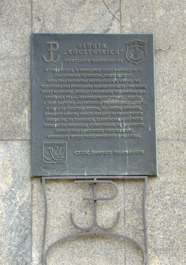 Jerozolimskie Aleje w Warszawie (fot Zu)